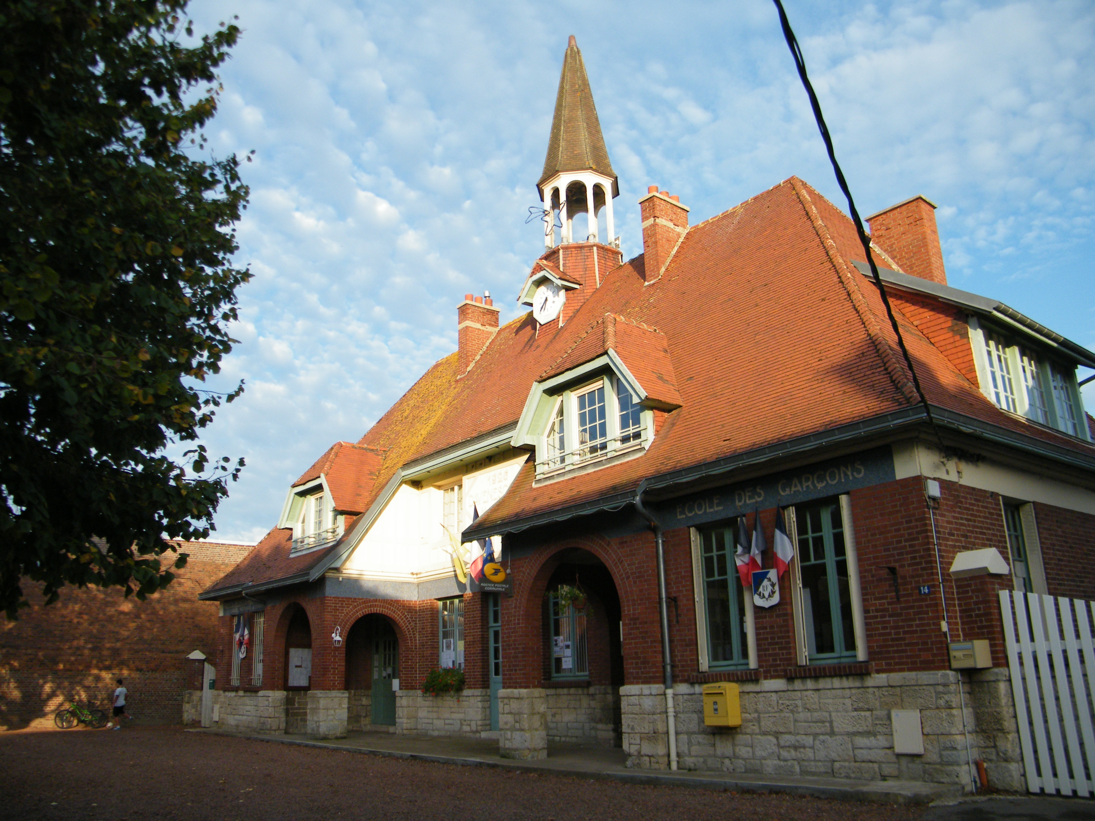 Mairie à clocheton, école de filles et école de garçons.